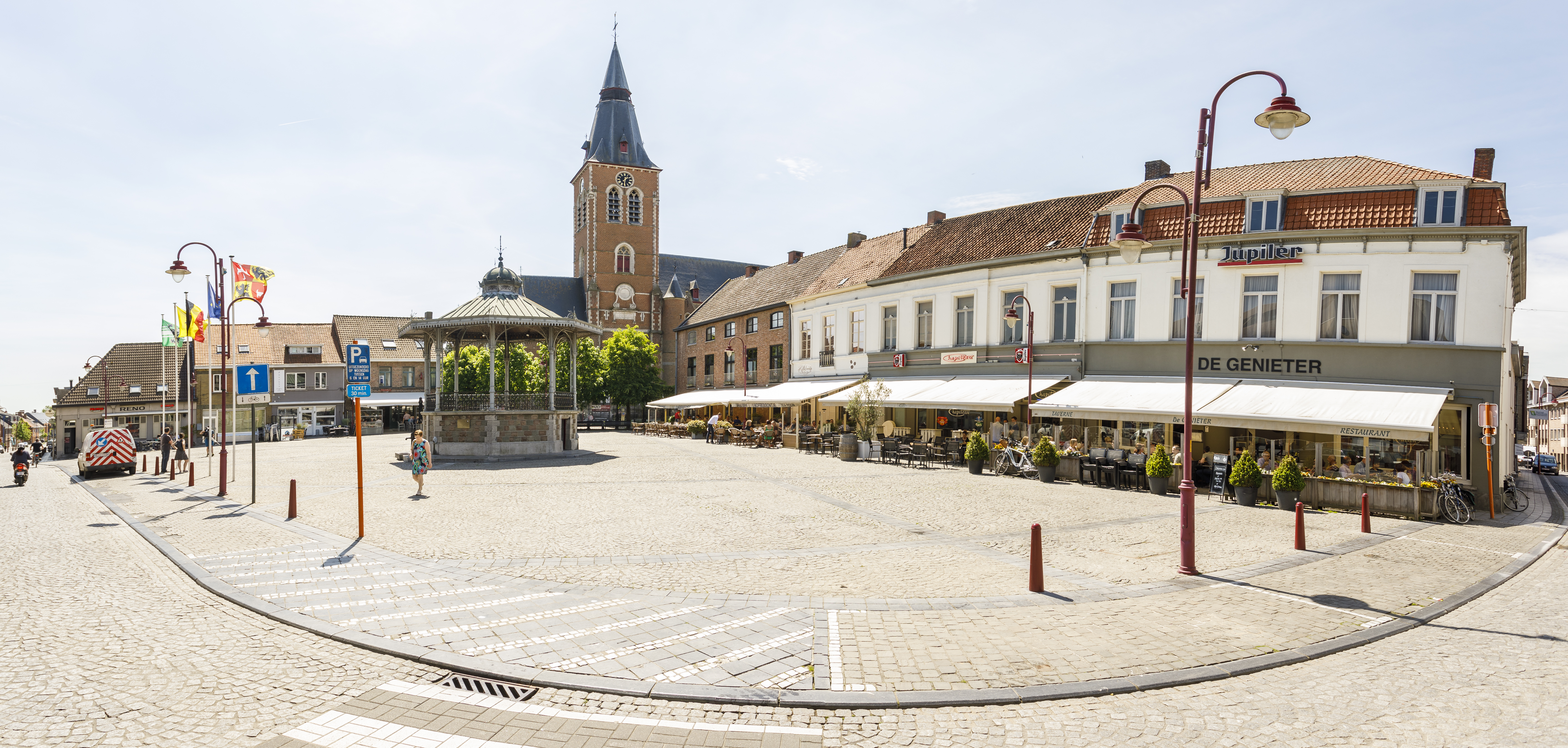 Sfeerzicht op de Markt van Aalter-centrum, met kiosk.